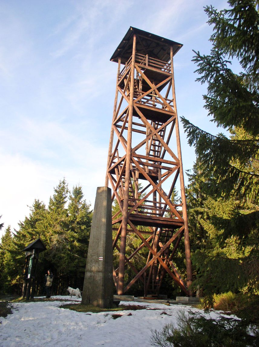 Wooden tower on Radziejowa Mountain. Author: PrzemekL